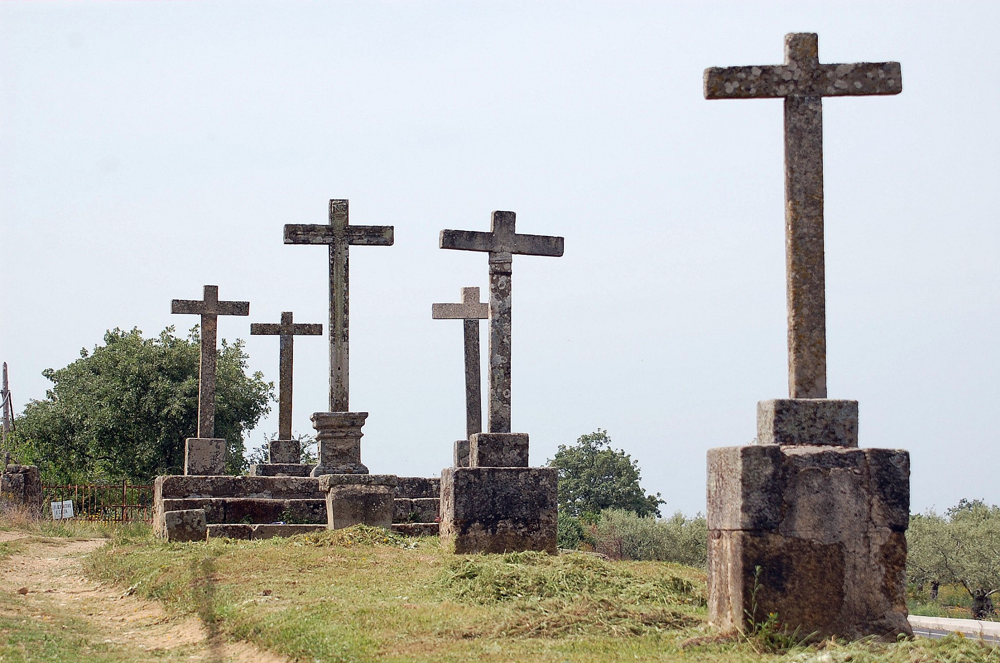 Calvario en Pozuelo de Zarzón, provincia de Cáceres, España.